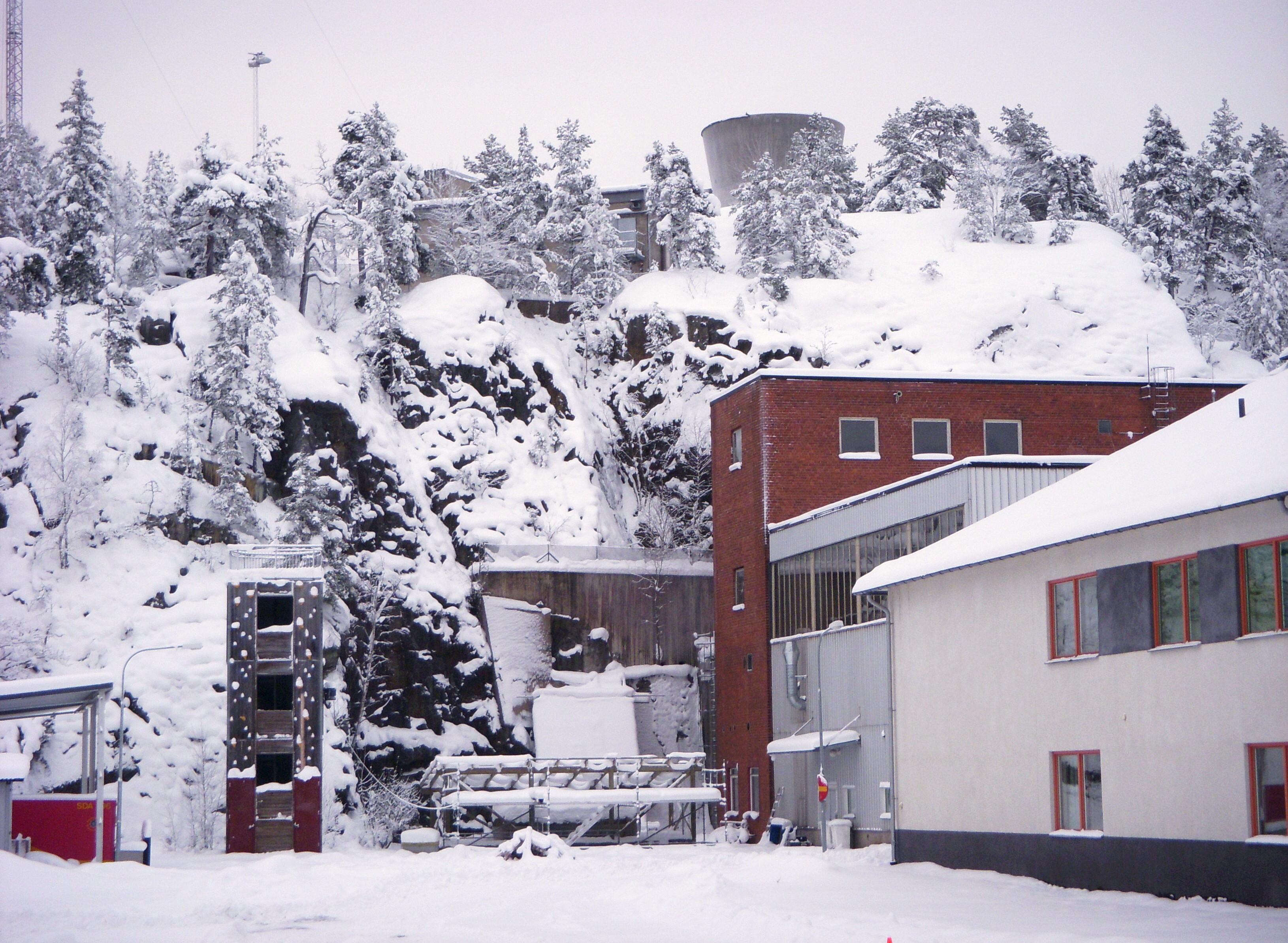 Ågestaverket, Huddinge